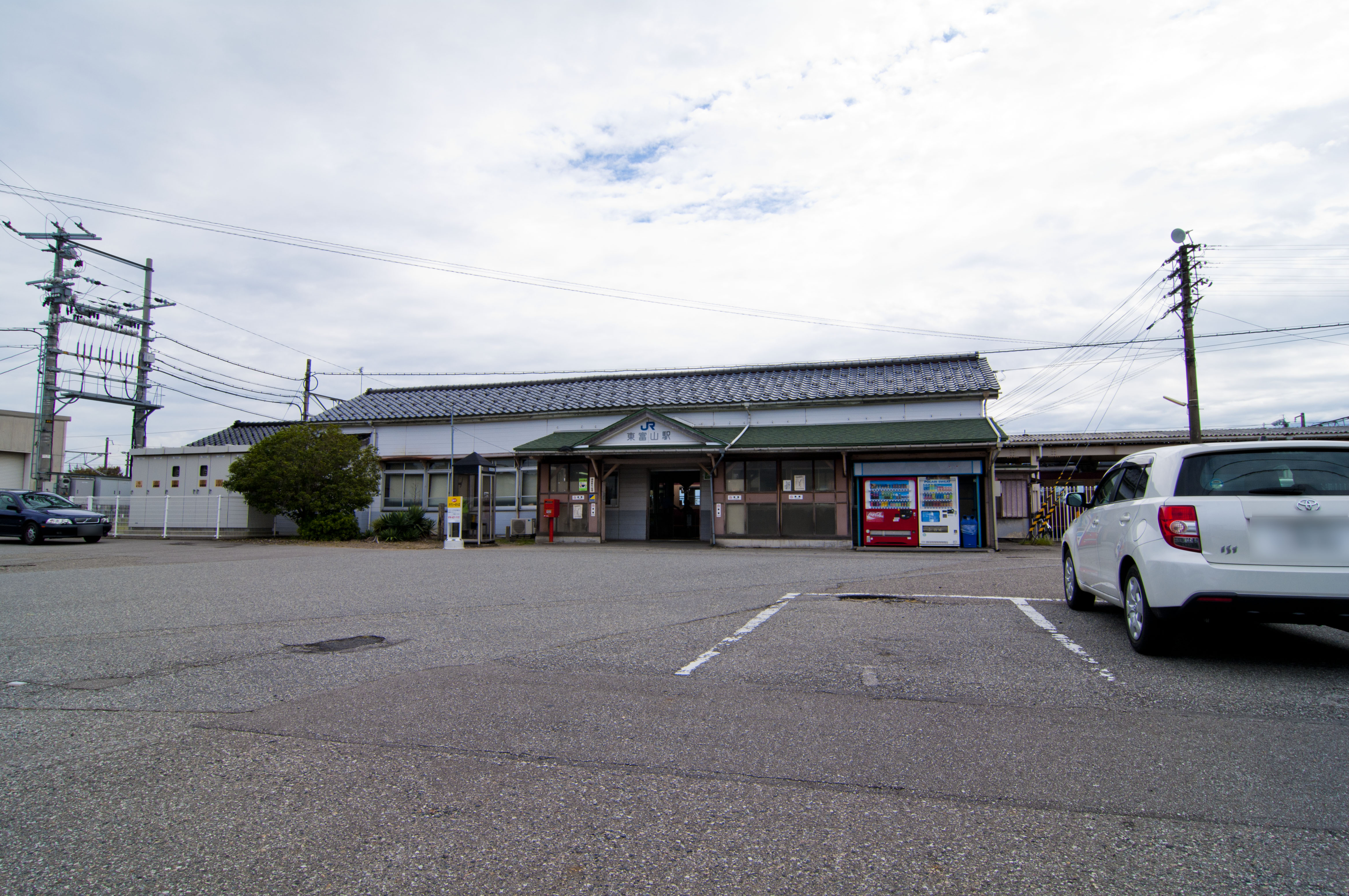 西日本旅客鉄道北陸本線東富山駅外観